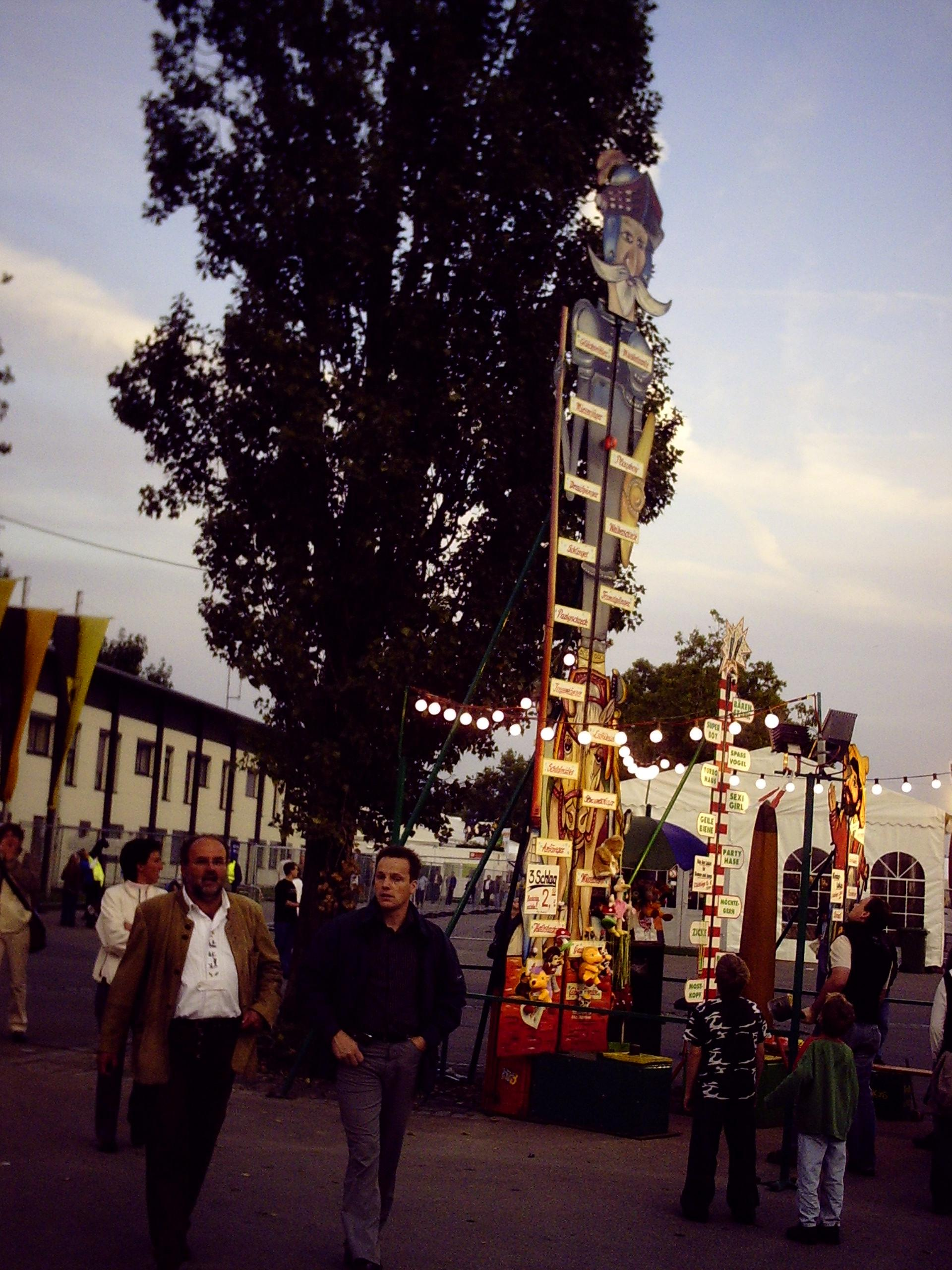 Hau den Lukas